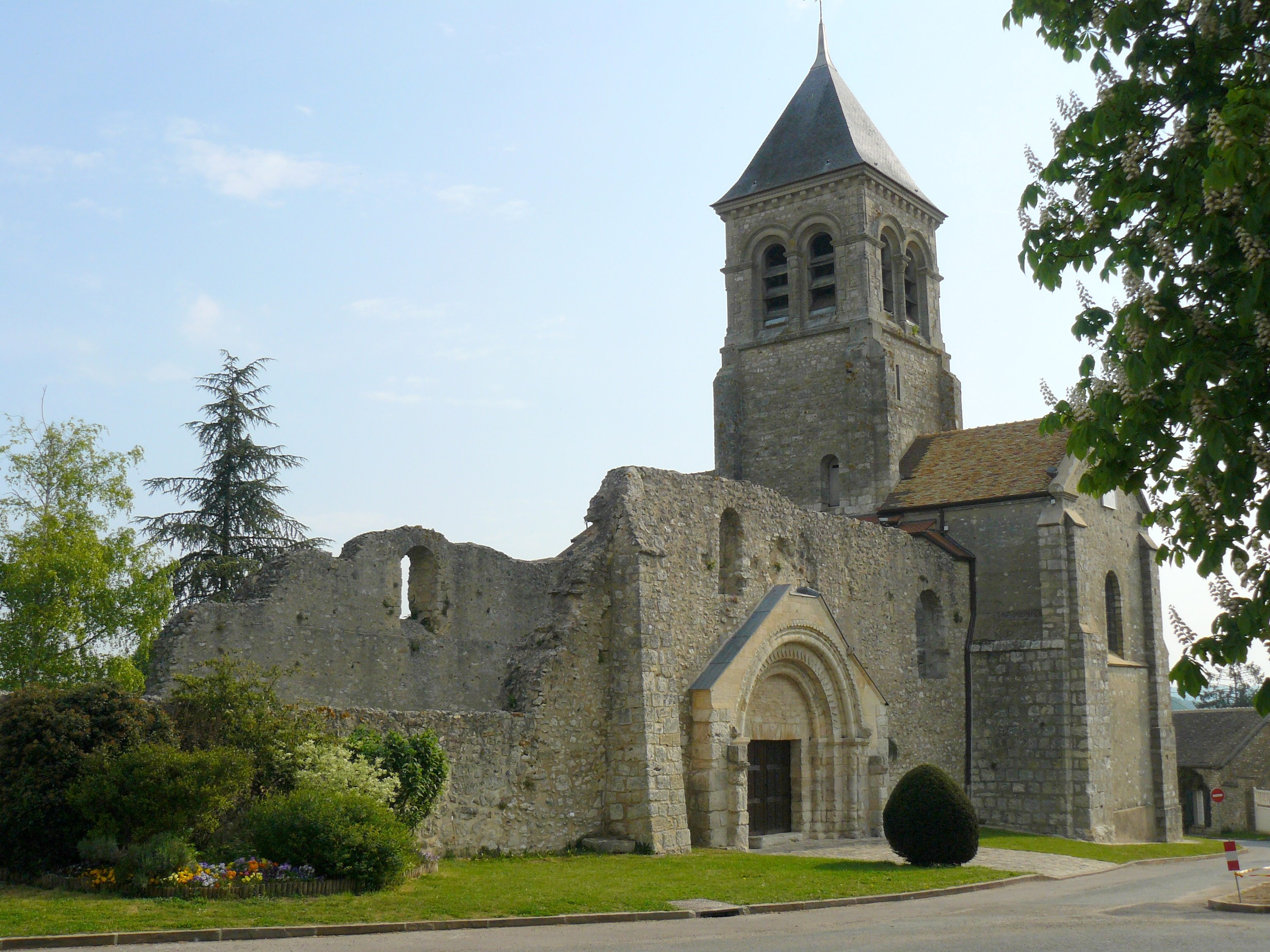 Eglise partiellement ruinée Sainte-Madeleine, à Montchauvet (Yvelines, France)